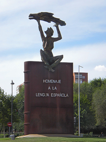 Fotografía de una escultura que homenajea a la lengua española, con El Quijote sentado en un libro. Leganés, España